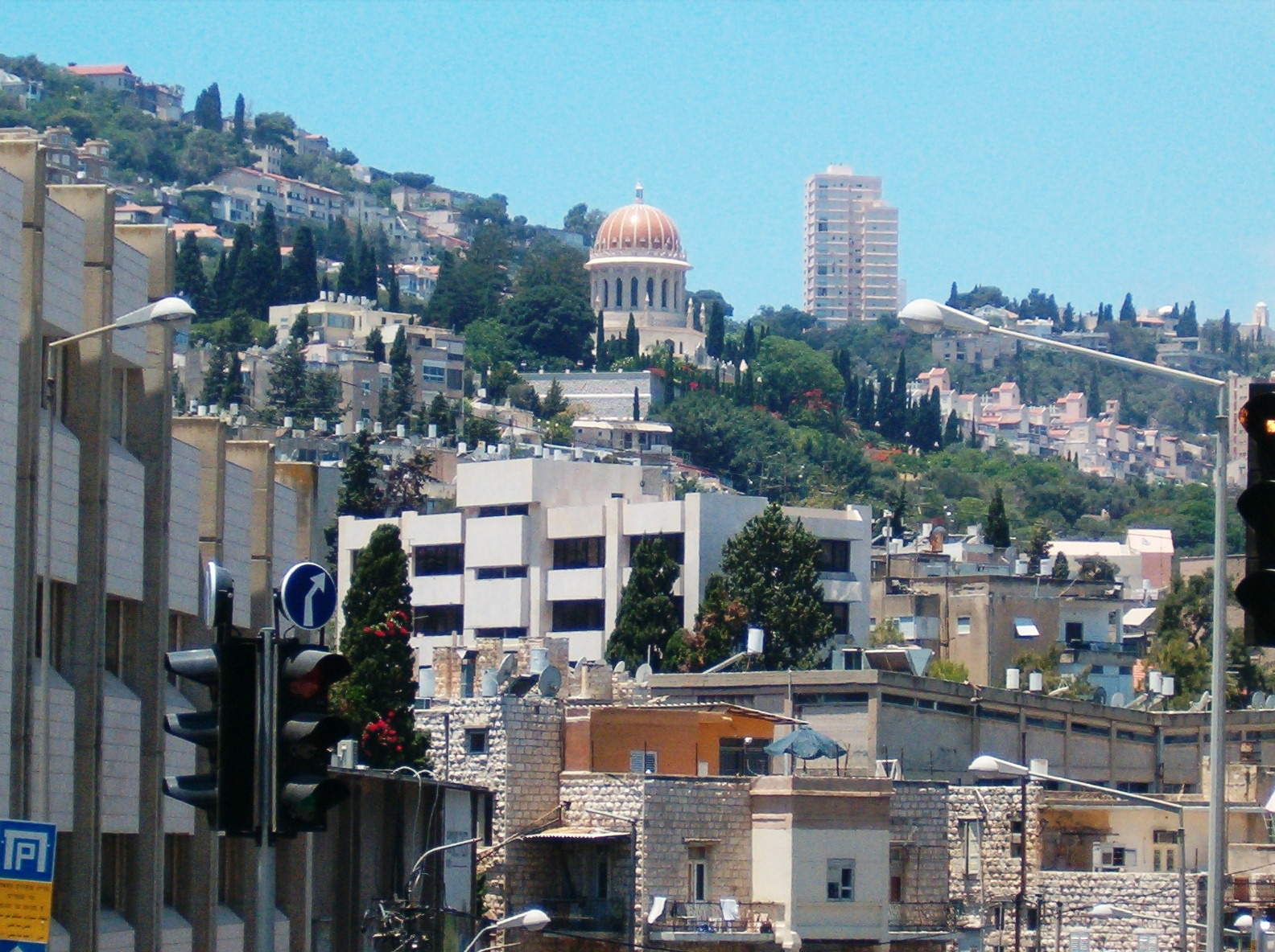 he:מקדש הבאב שבמרכזם של הגנים הבהאיים, כפי שנשקף מפינת הרחובות הנביאים ושבתאי לוי שבשכונת הדר הכרמל, he:חיפה